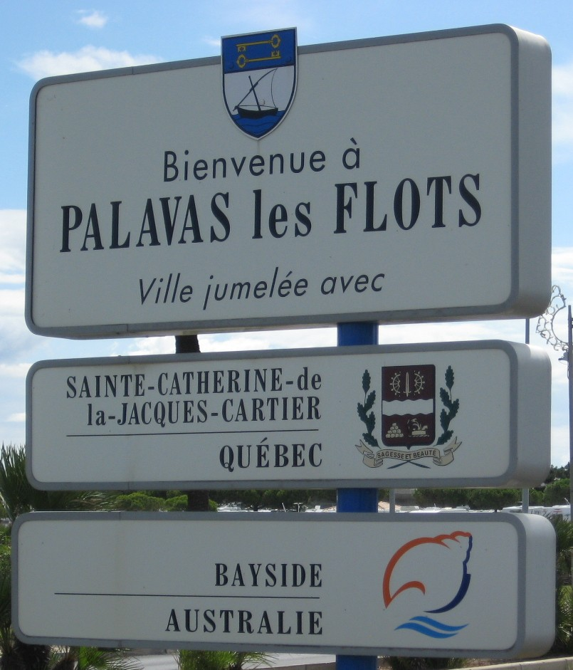 Panneau routier indiquant l'entrée dans la ville de Palavas-les-Flots (France), avec l'indication des villes jumelles